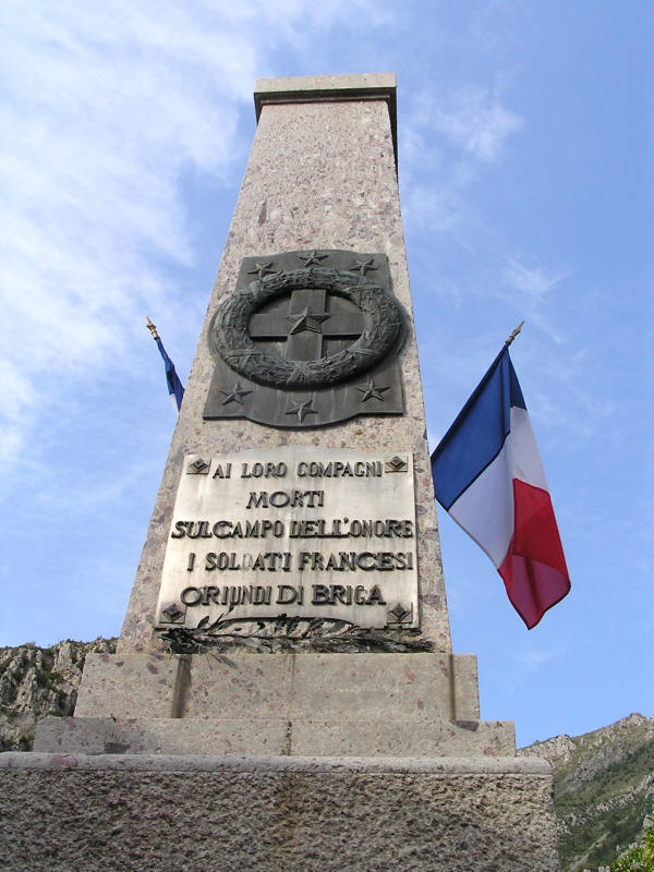 Monumento ai caduti a Briga Marittima costruito quando faceva parte dell'Italia. L'epitaffio recita: AI LORO COMPAGNI MORTI SUL CAMPO DELL'ONORE I SOLDATI FRANCESI ORIUNDI DI BRIGA